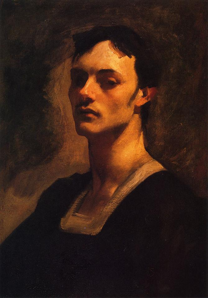 Albert de Belleroche (1864-1944) par John Singer Sargent en 1883. Collection particulière.